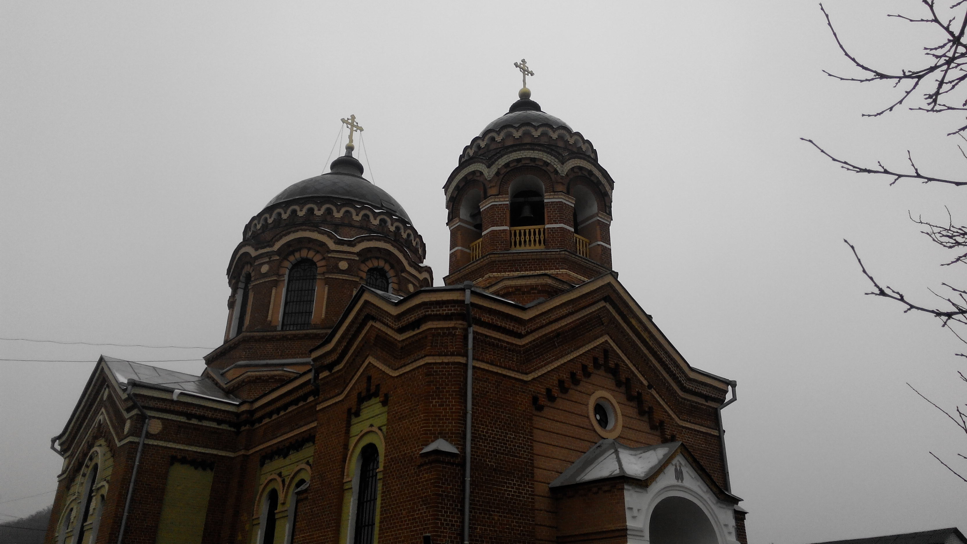 Україна. Зміївський район. с. Водяне. Борисоглібський монастир. Борисоглібський храм. 2014